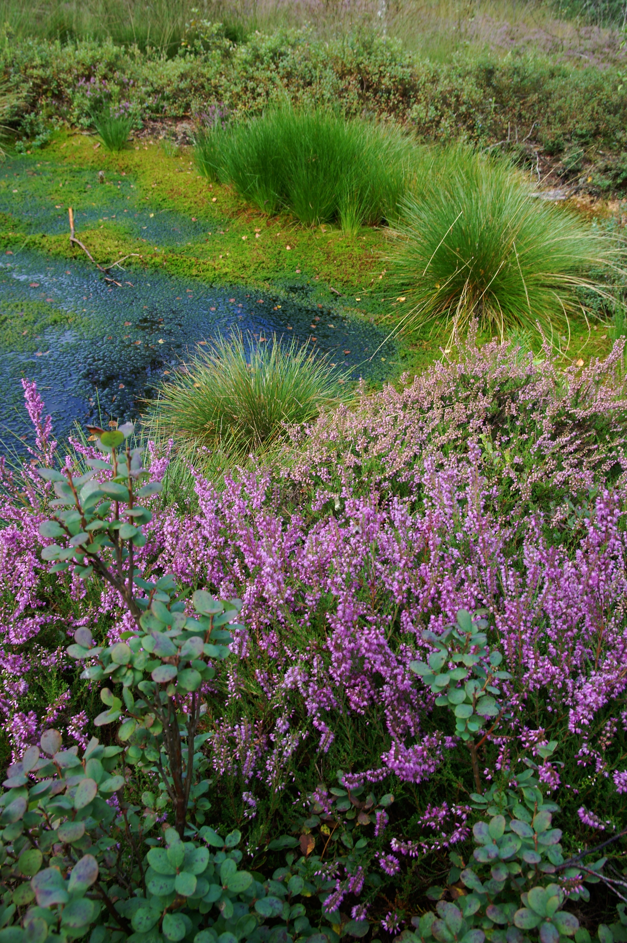 Pflanzengesellschaft im Moor, Haspelmoor (Bayern)